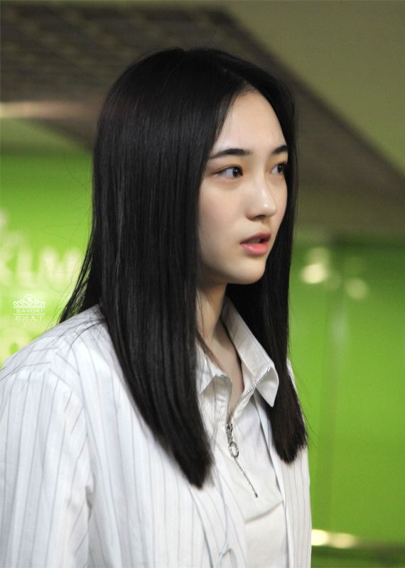 20160619 浦东机场 part1 (赵嘉敏)